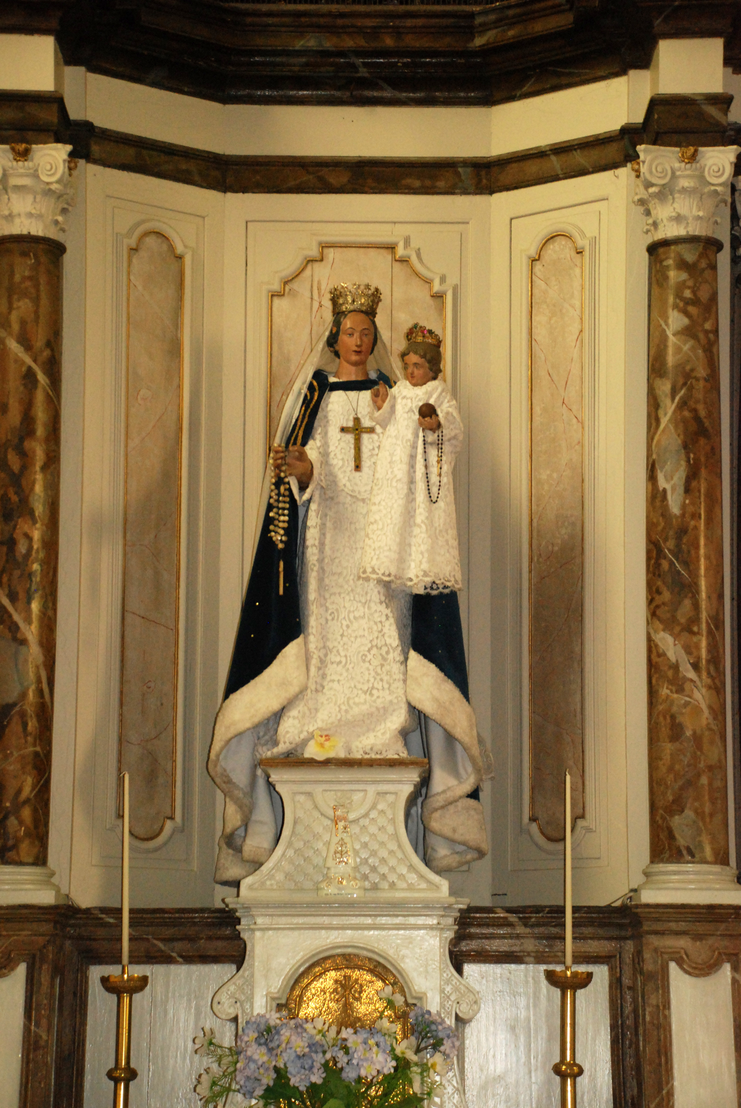 Belgique - Bousval - Église Saint-Barthélemy de Bousval